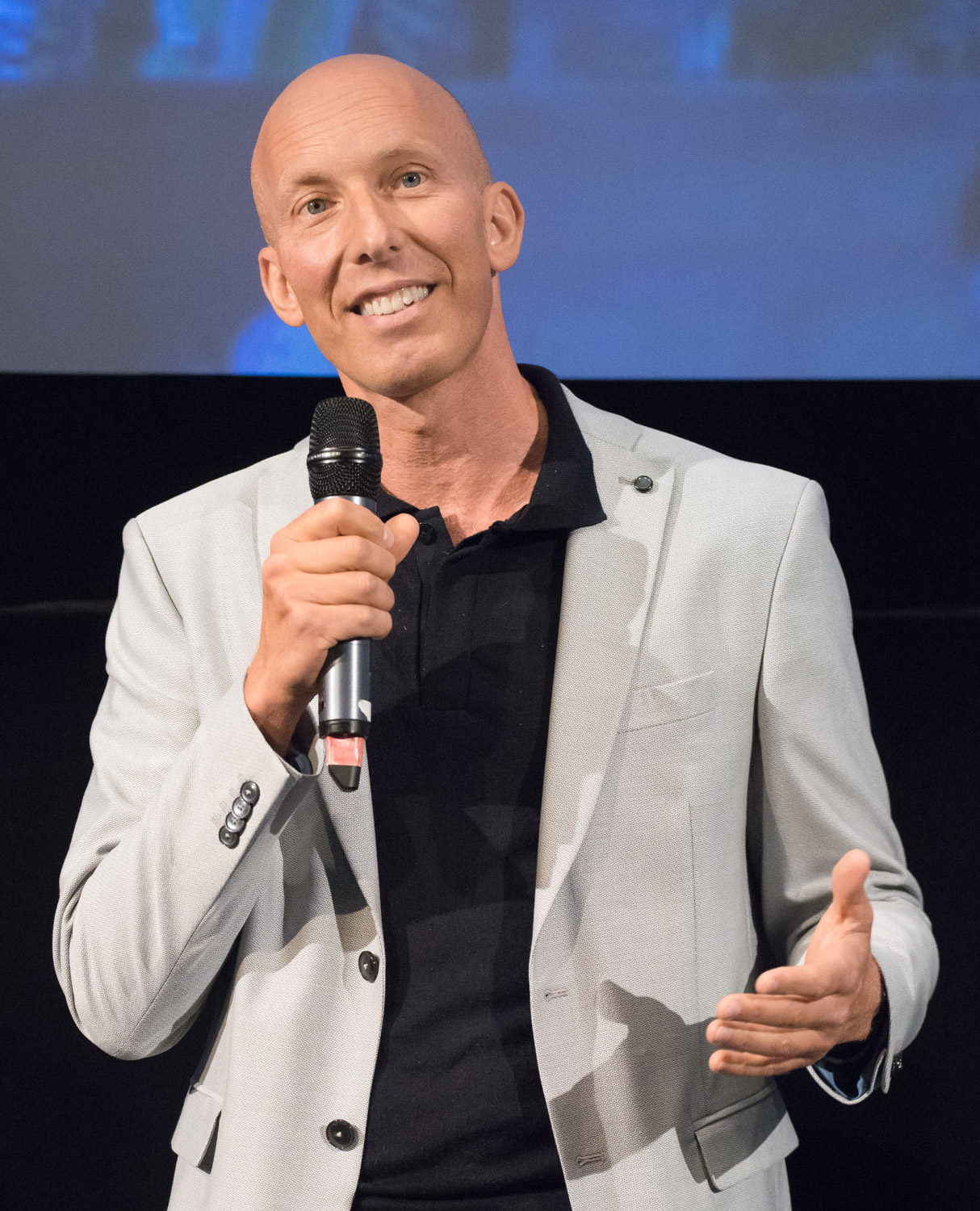 Erik Gandini under presentationen av filmen "The Swedish Theory of Love" i Filmhuset i Stockholm den 17 augusti 2015.